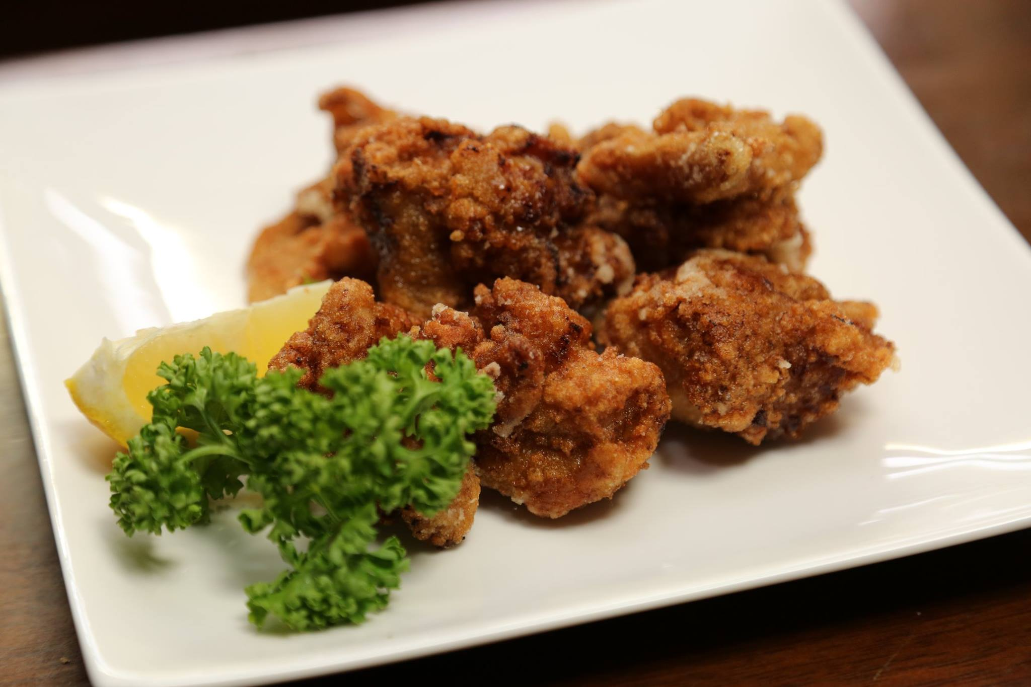 ながとりめんと並ぶ代表メニュー